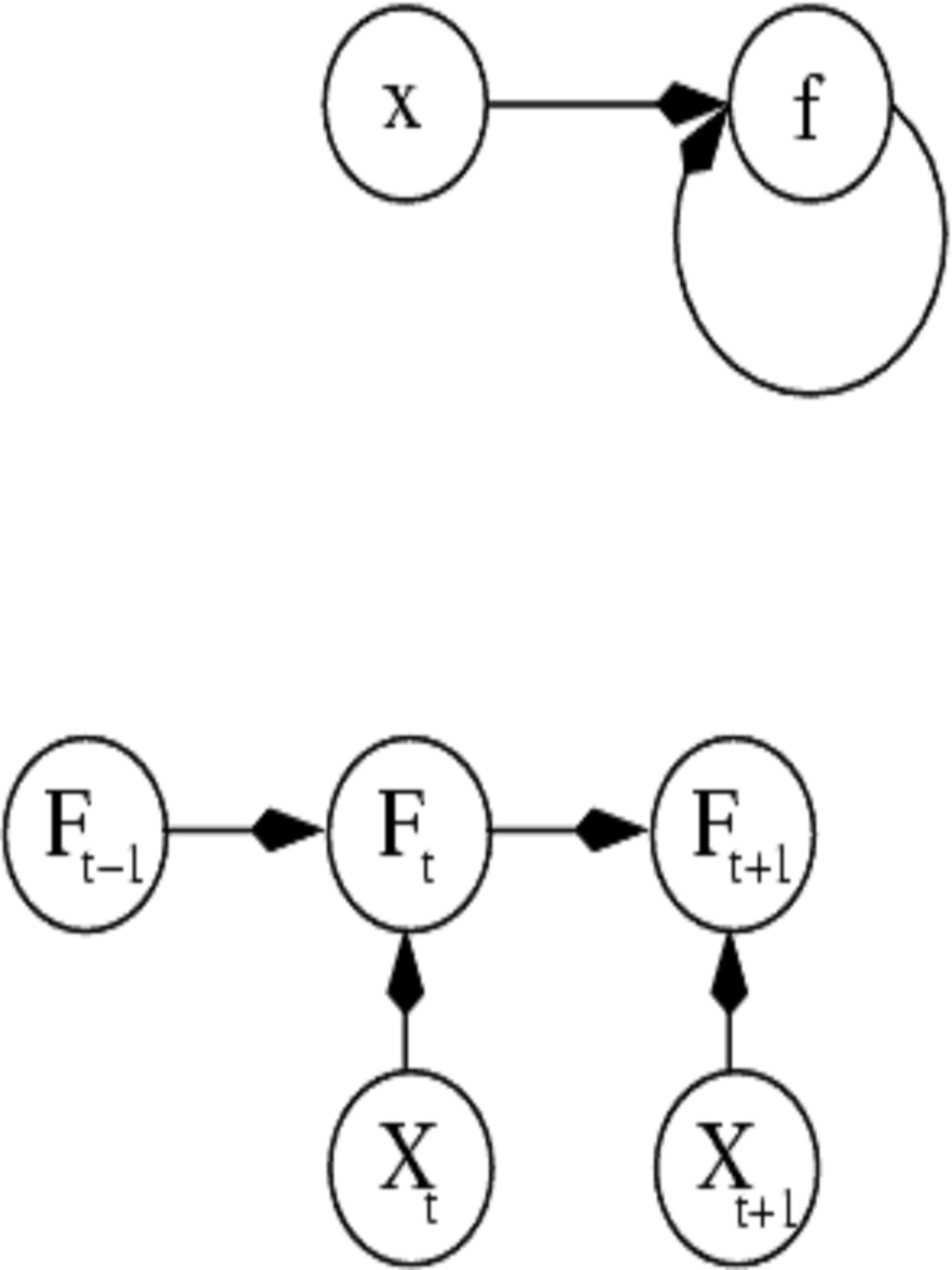 Ann Recurrente edit_2017.jpg